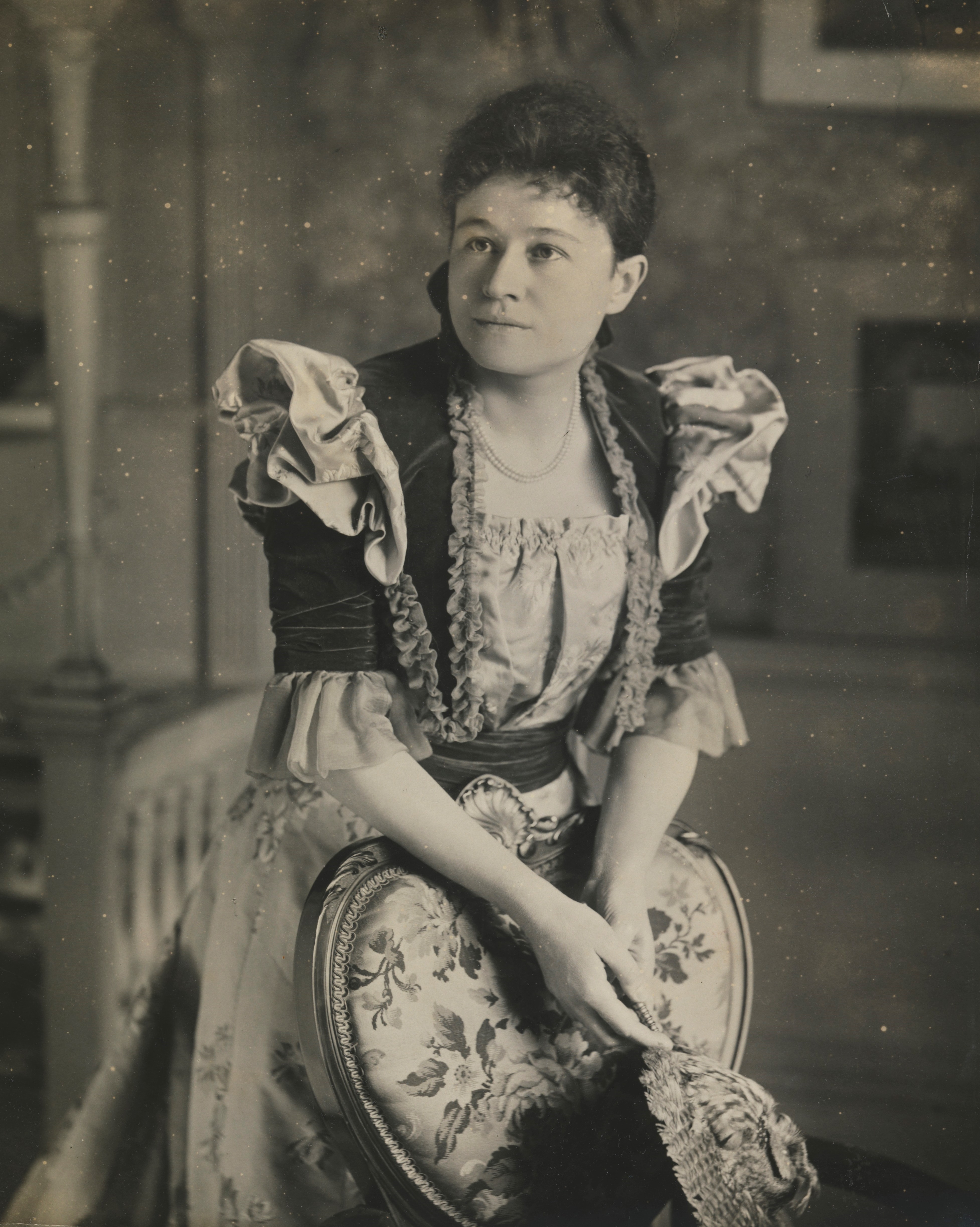 Eva Nansen som nygift. Depicted person: Nansen, Eva (1858-1907); født Sars Depicted place: Storbritannia, London